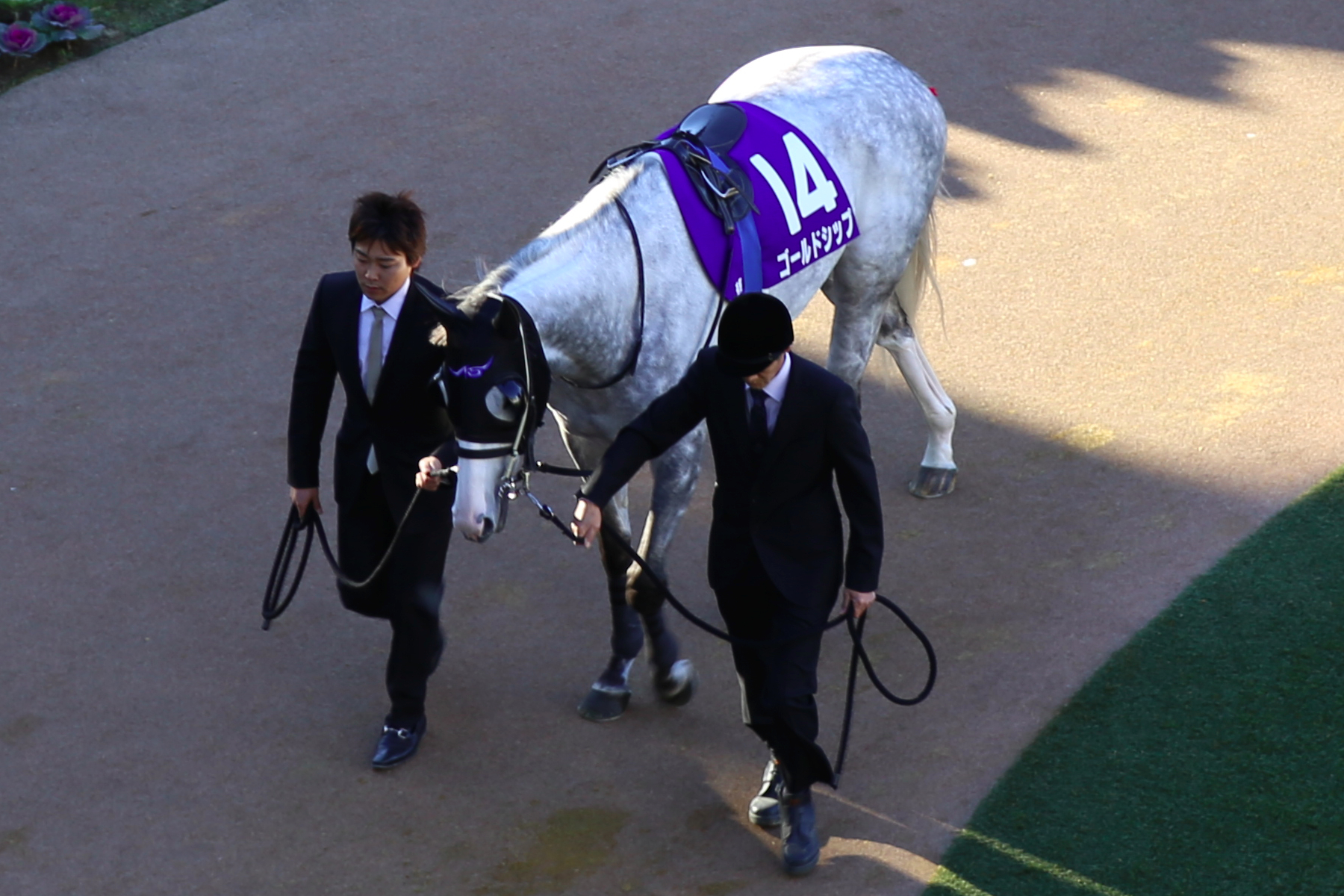 2013年有馬記念でのゴールドシップ